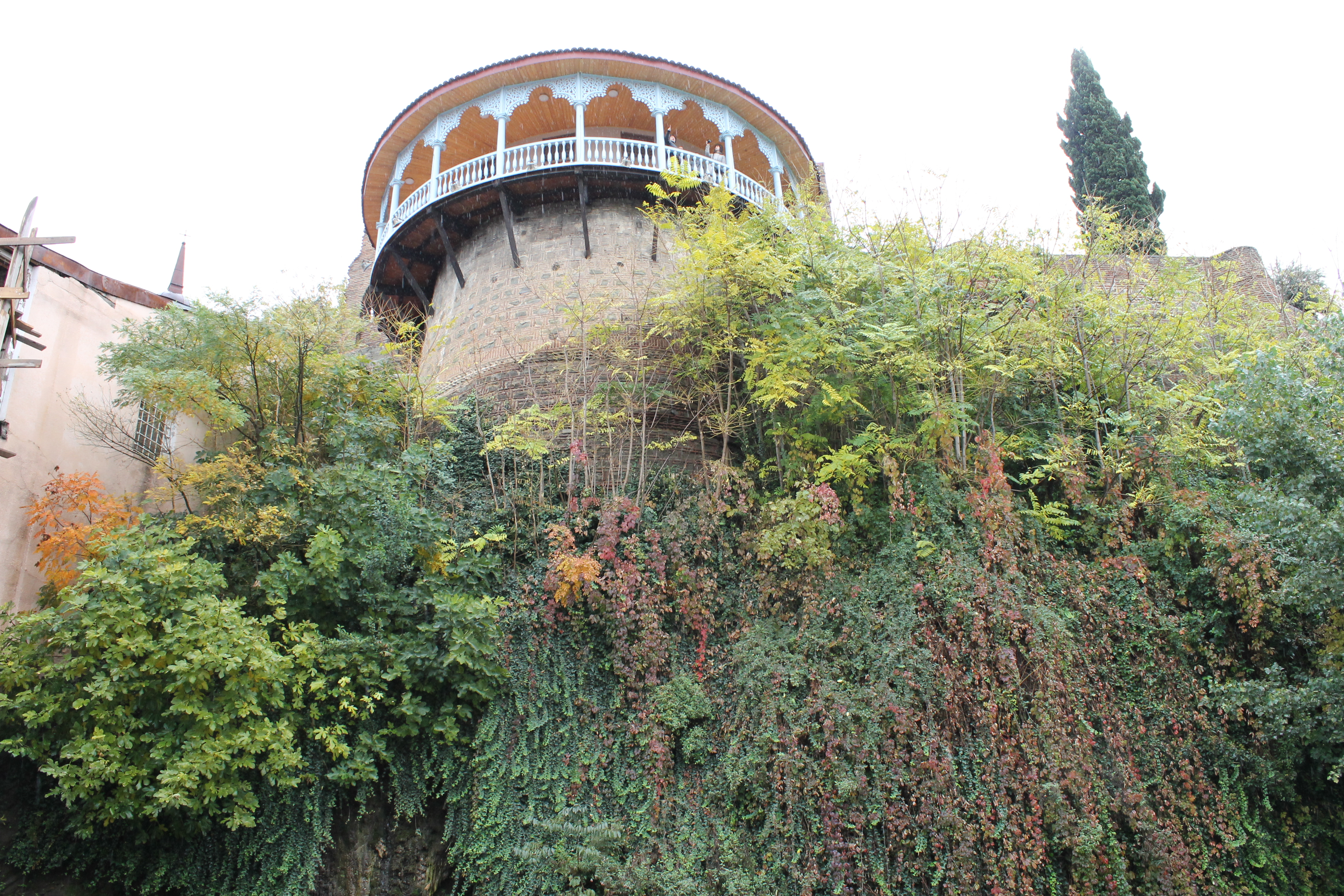 Тбилиси. Улица Винный подъём. Беседка дворца царицы Дареджан